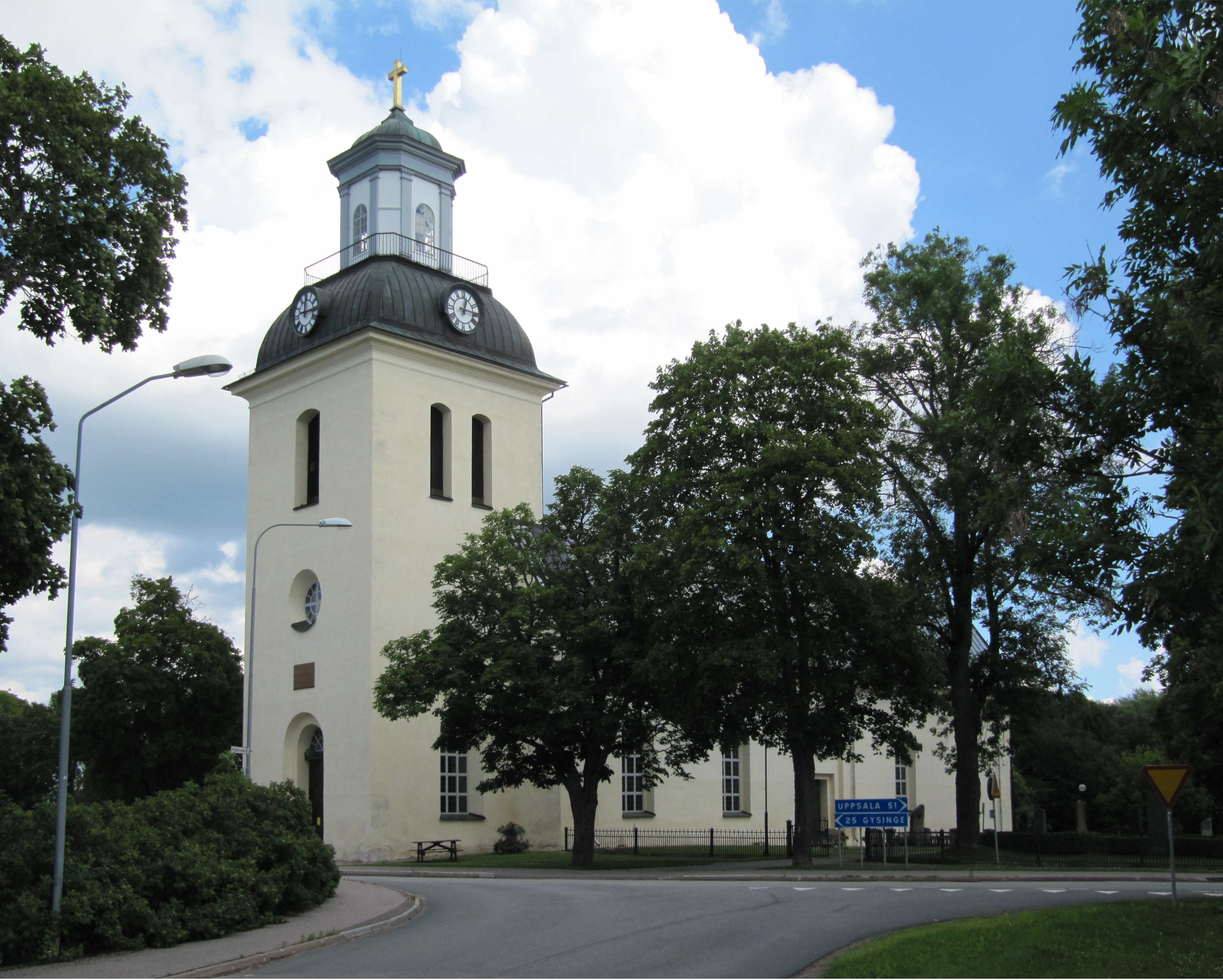 Östervåla kyrka. Länsväg 272 passerar framför kyrkans ingång i väster.